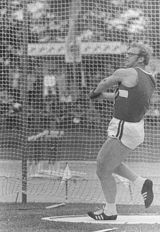 Jochen Sachse ADN-ZB Demme 24.06.1972 Erfurt:XXIII. DDR-Leichtathletik-Meisterschaften (3.Tag) -Mit der neuen DDR-Rekordweite von 74,76 m erkämfte sich Jochen Sachse(SC Karl-Marx-Stadt) den Titel im Hammerwerfen.